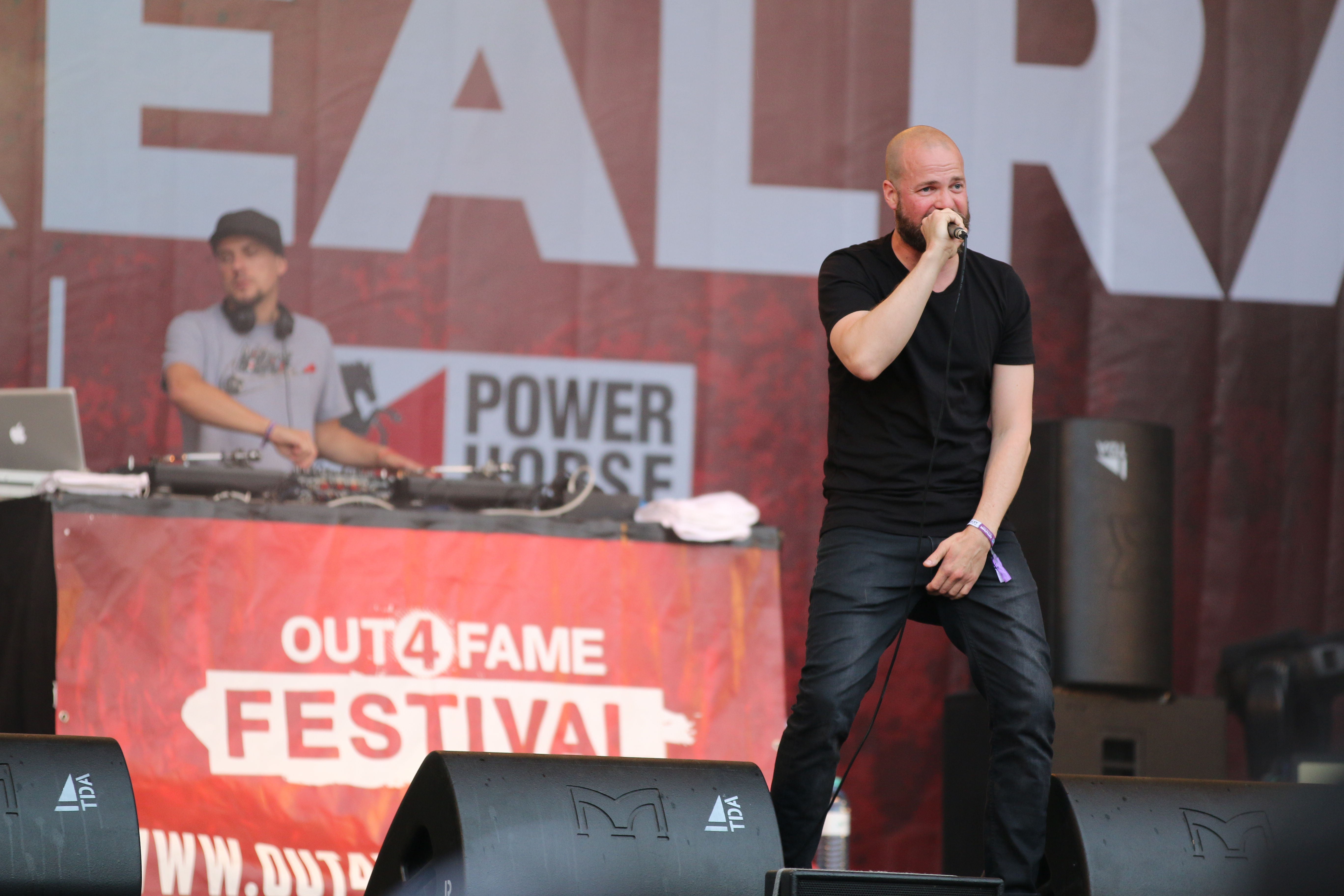 Curse